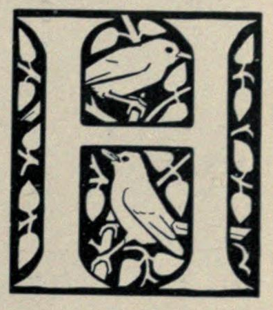 lettrine H avec oiseaux